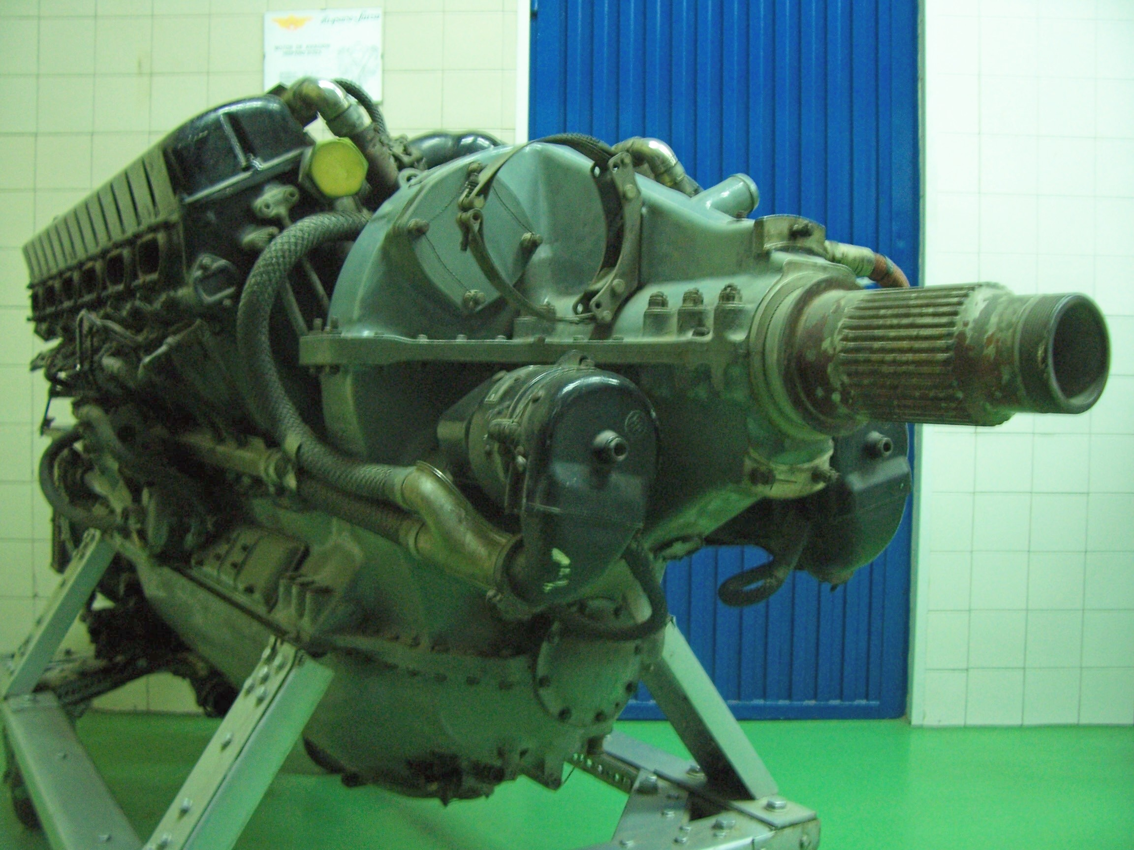 Motor Hispano Suiza 89 12 Z-17, el darrer motor d'aviació fabricat en fàbrica de la Sagrera